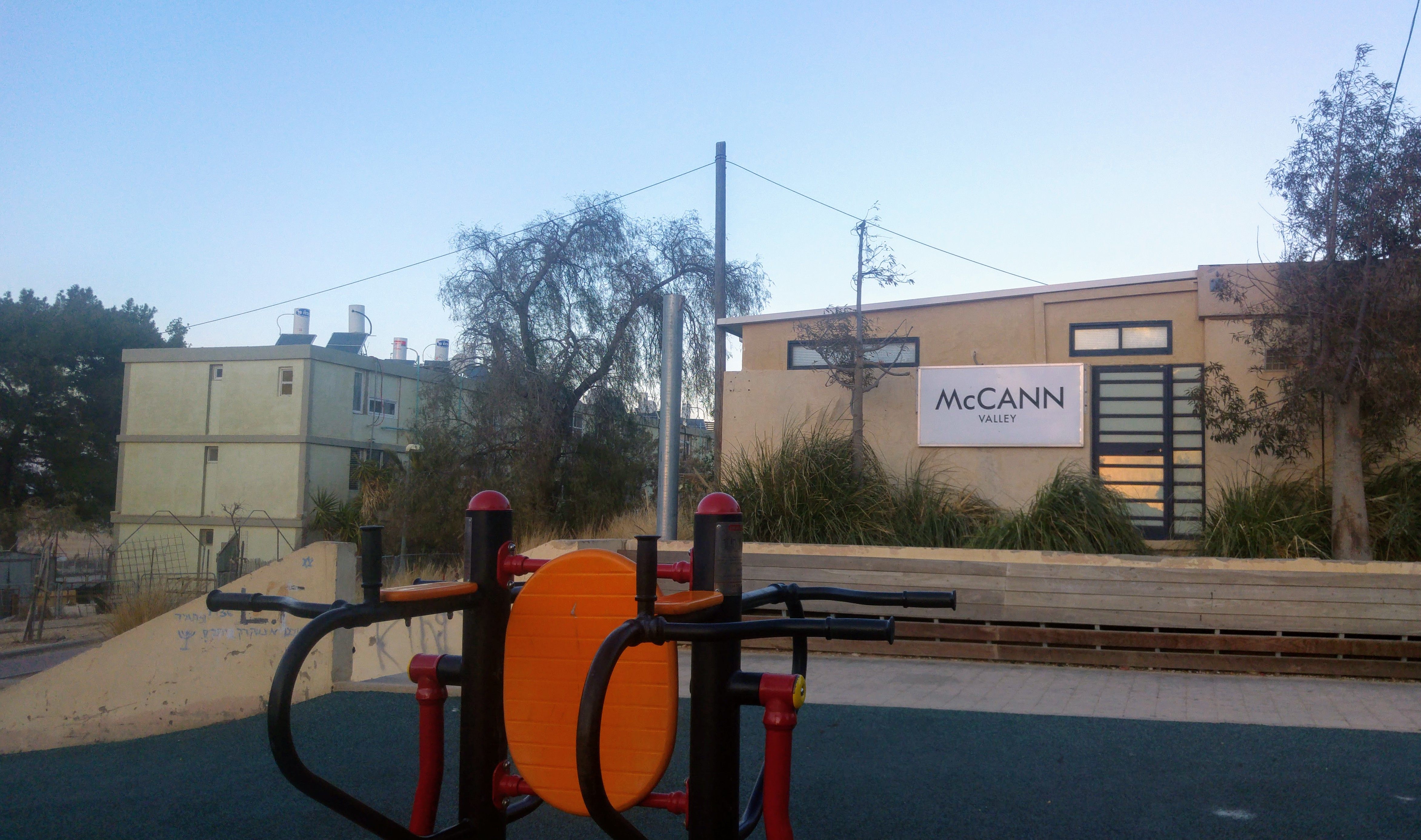 מקאן וואלי במצפה רמון